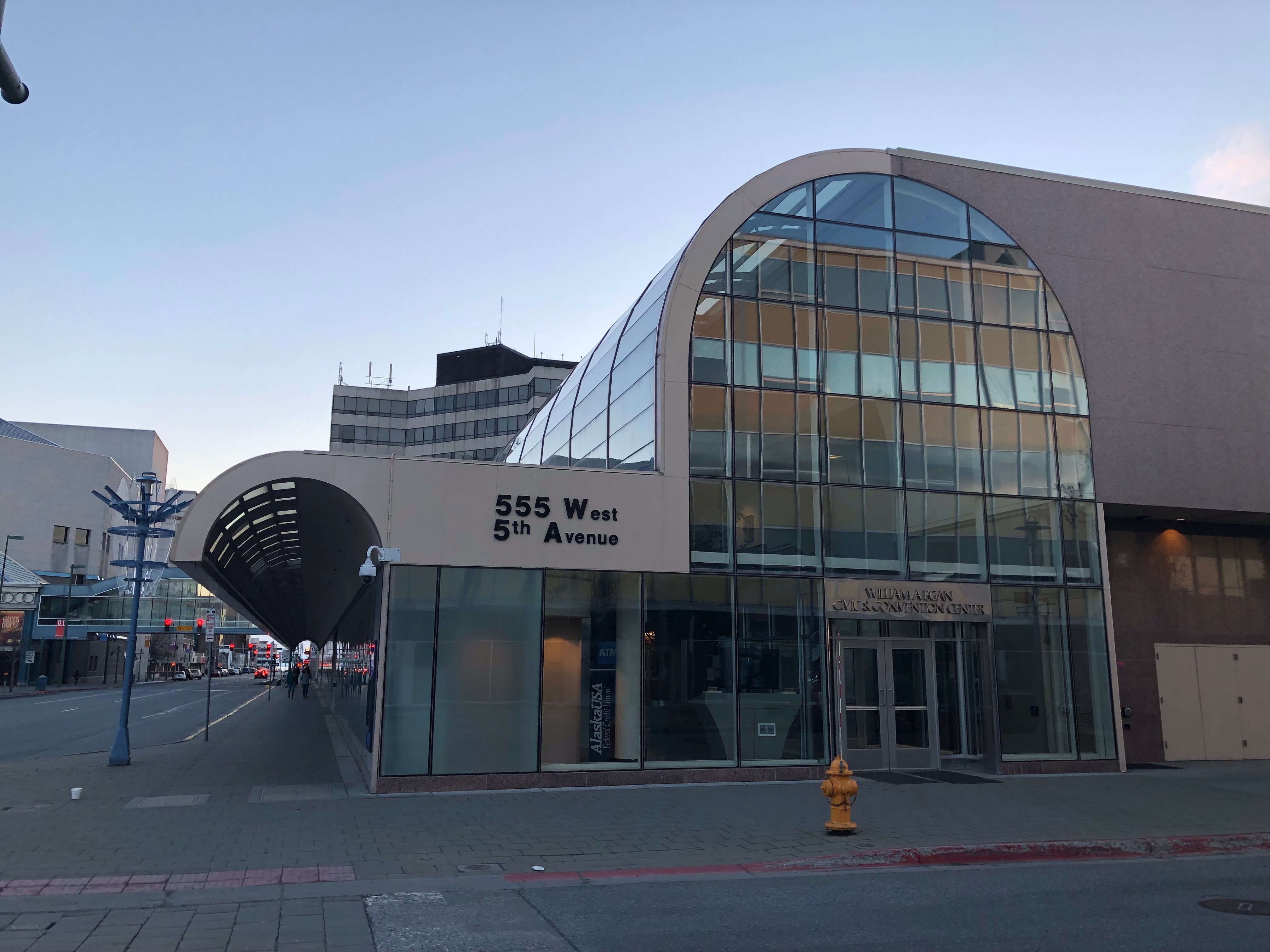 Egan Center